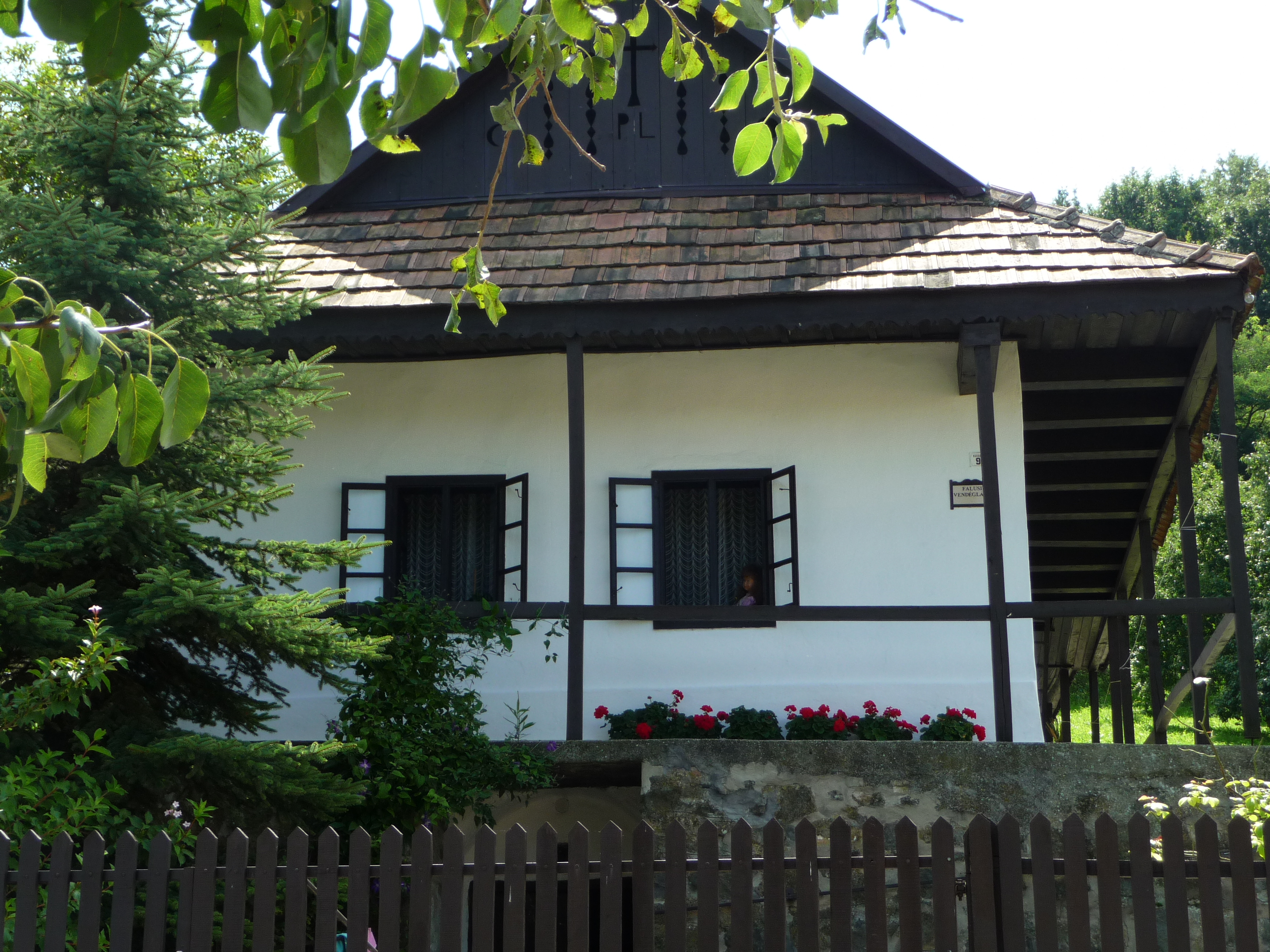 Hollókő, Kossuth u. 90.